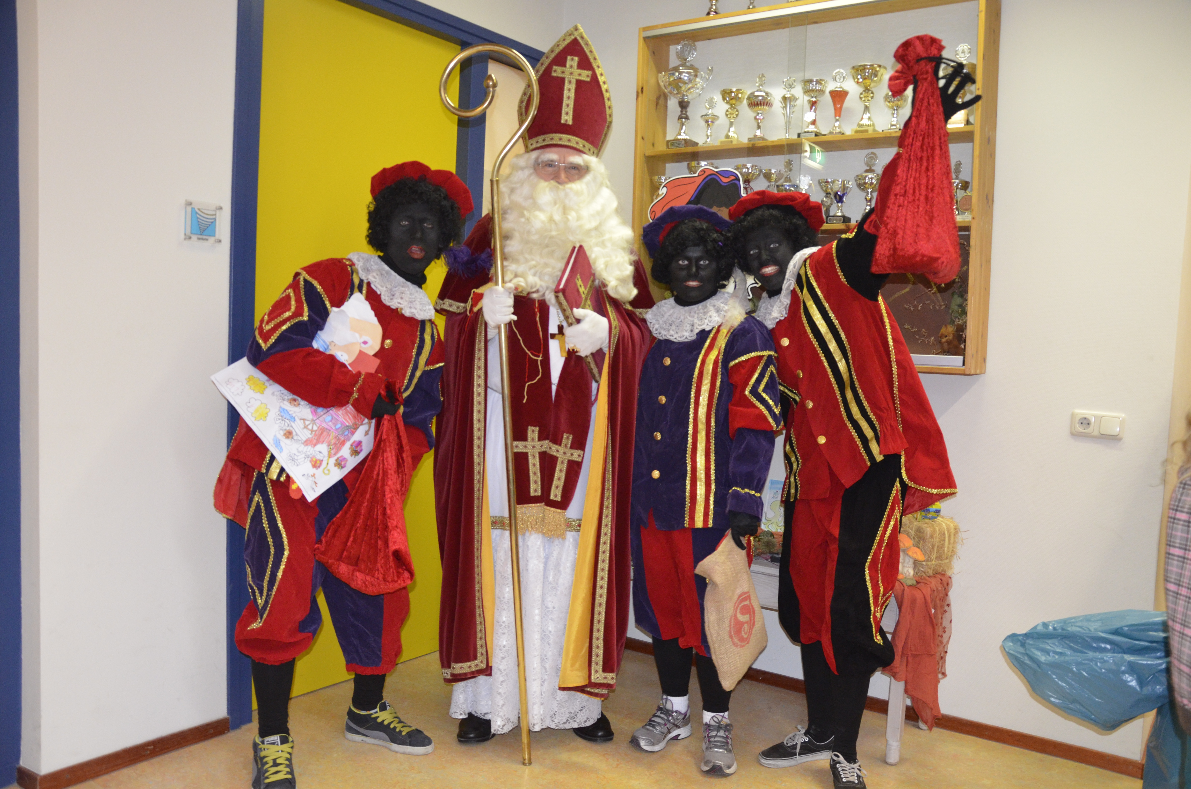 Sinterklaas 2012, de Diedeldoorn